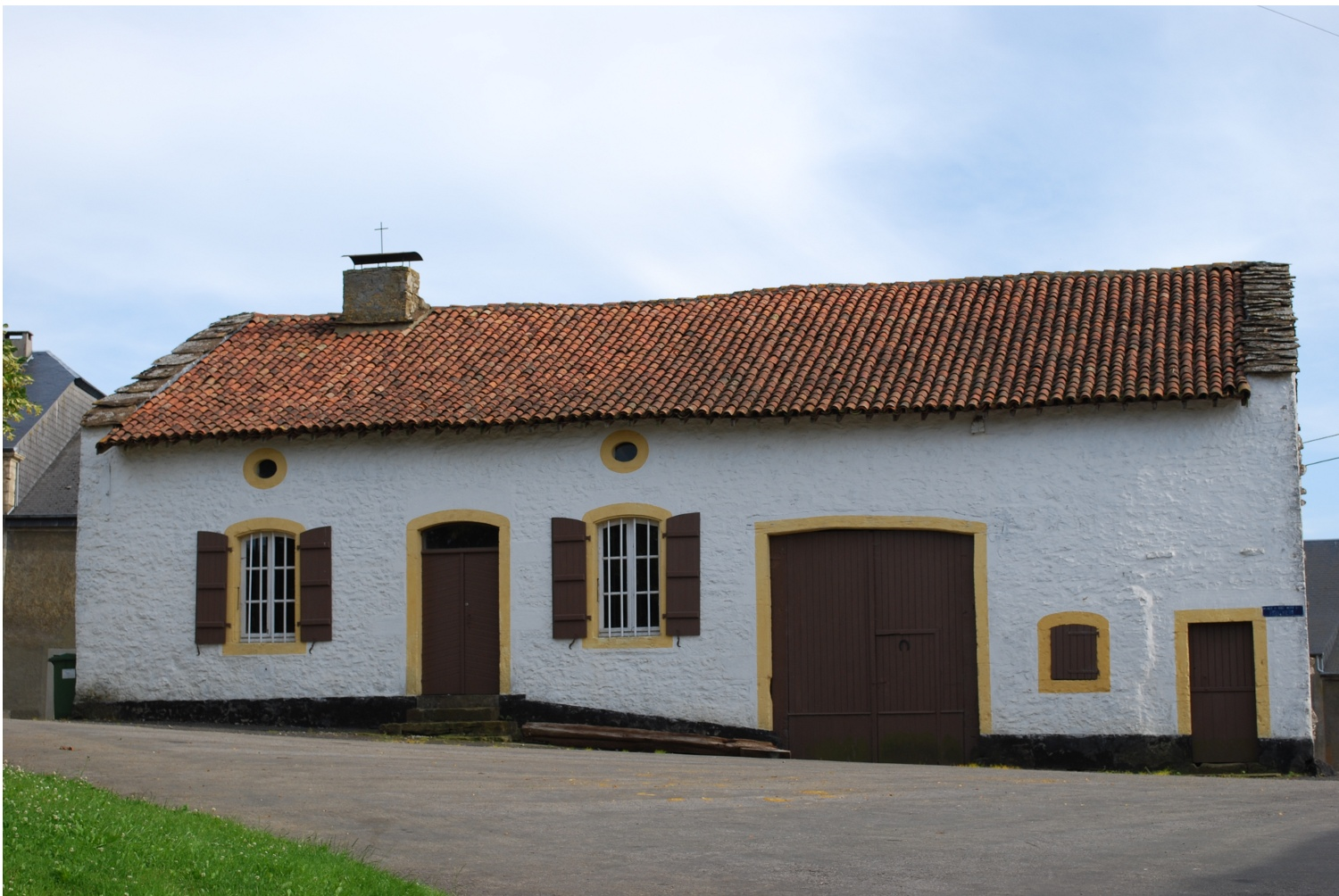 Ferme de la dîme à Montquintin (Belgique). Actuellement, elle abrite le musée de la vie paysanne.